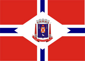 Flag of city of Franco da Rocha, São Paulo, BrazilBandeira da cidade de: Franco da Rocha, São Paulo, Brasil